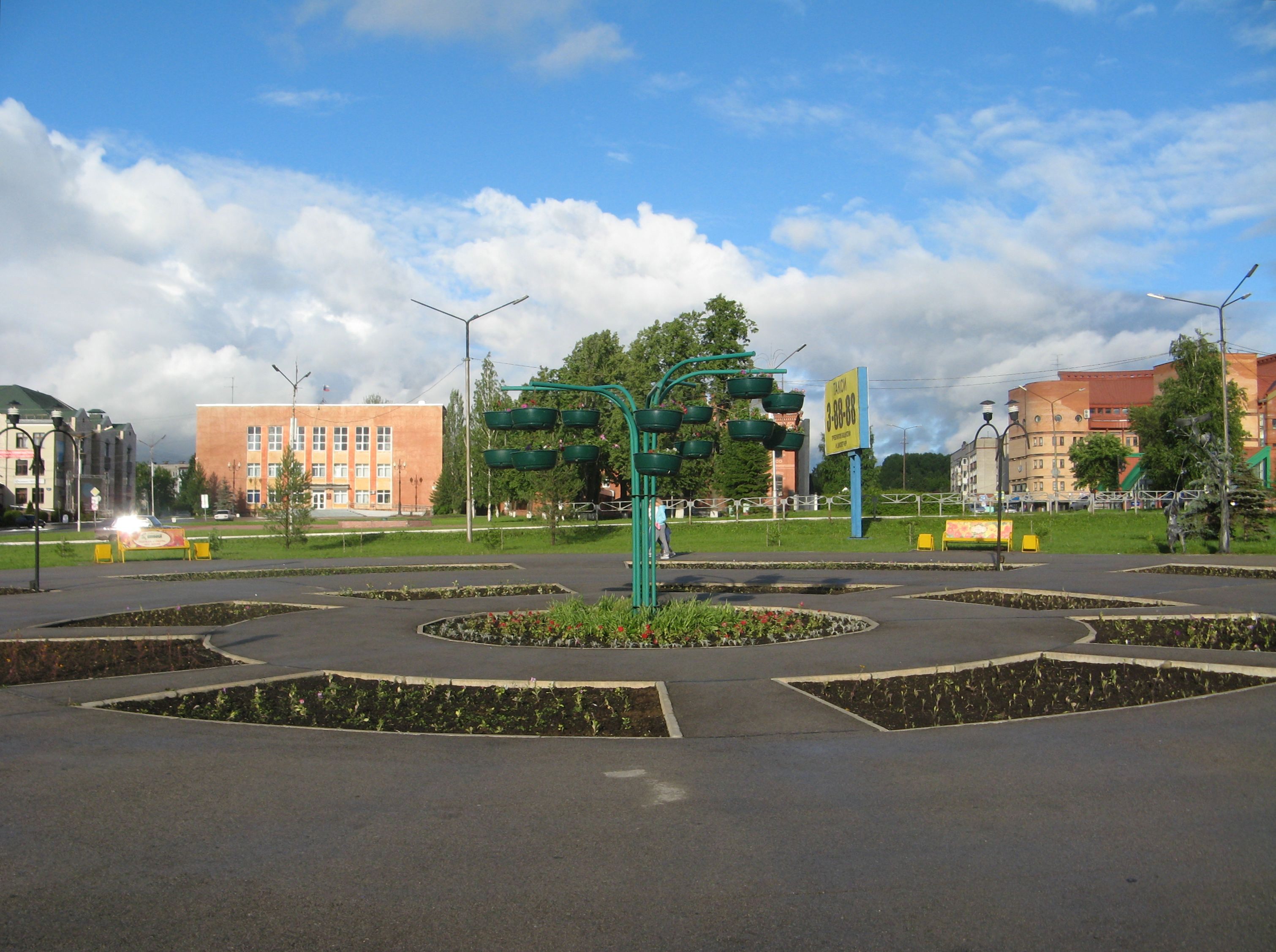 Лысьва. Площадь Цветов